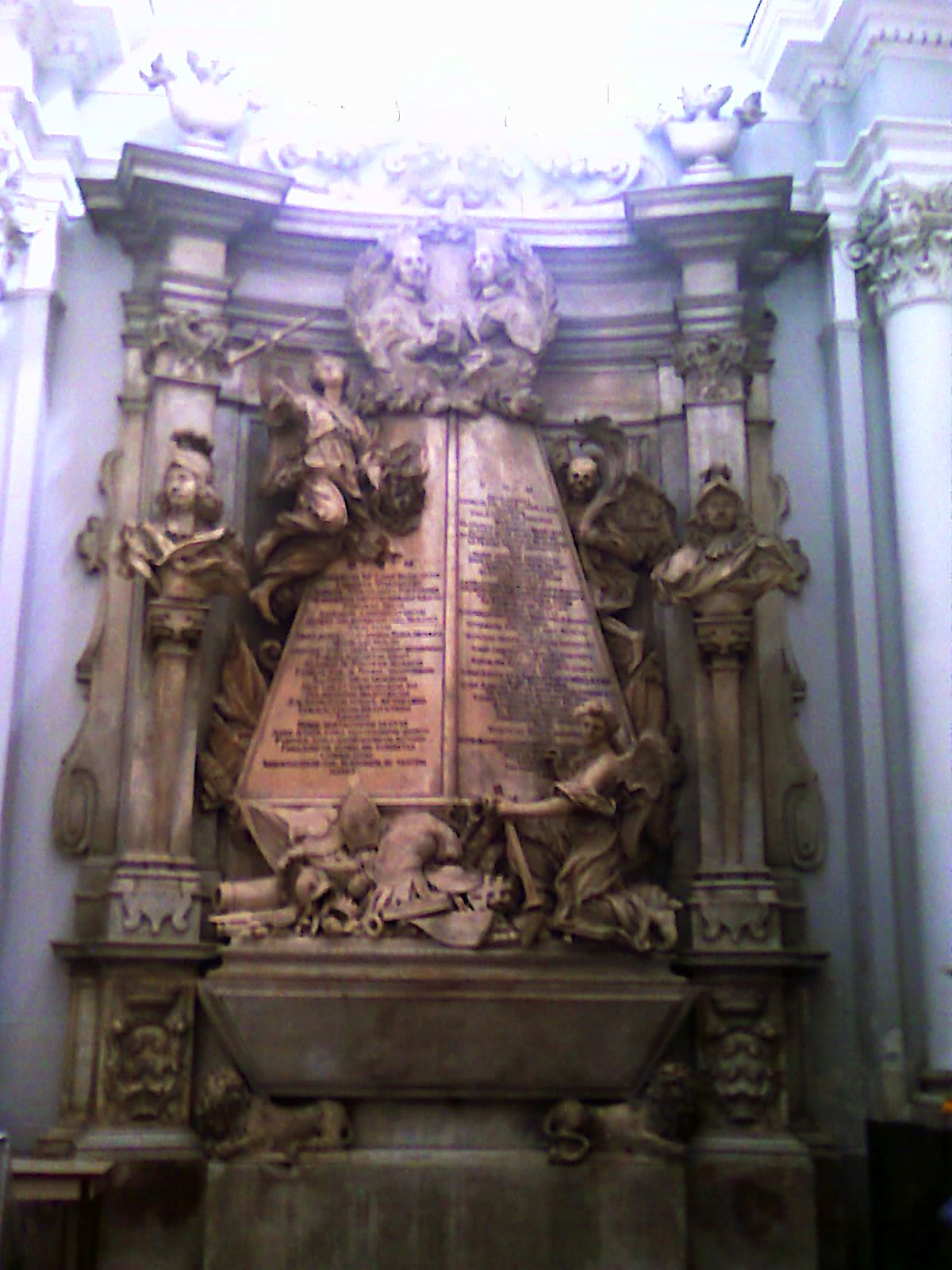 Napoli - Chiesa di Sant'Angelo a Nilo - Tomb of Cardinal Francesco Maria Brancaccio (1592-1675) and his nephew, Cardinal Stefano Brancaccio (1618-1682)